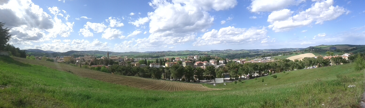 Panoramica di Castelleone di Suasa, 21 aprile 2012